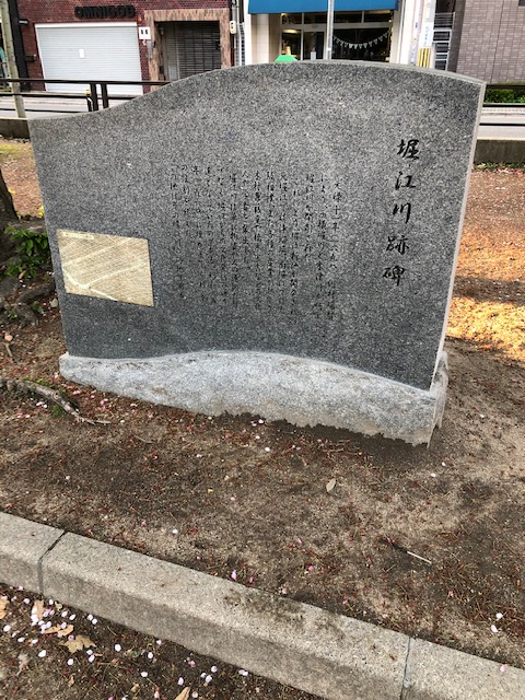 堀江川跡碑